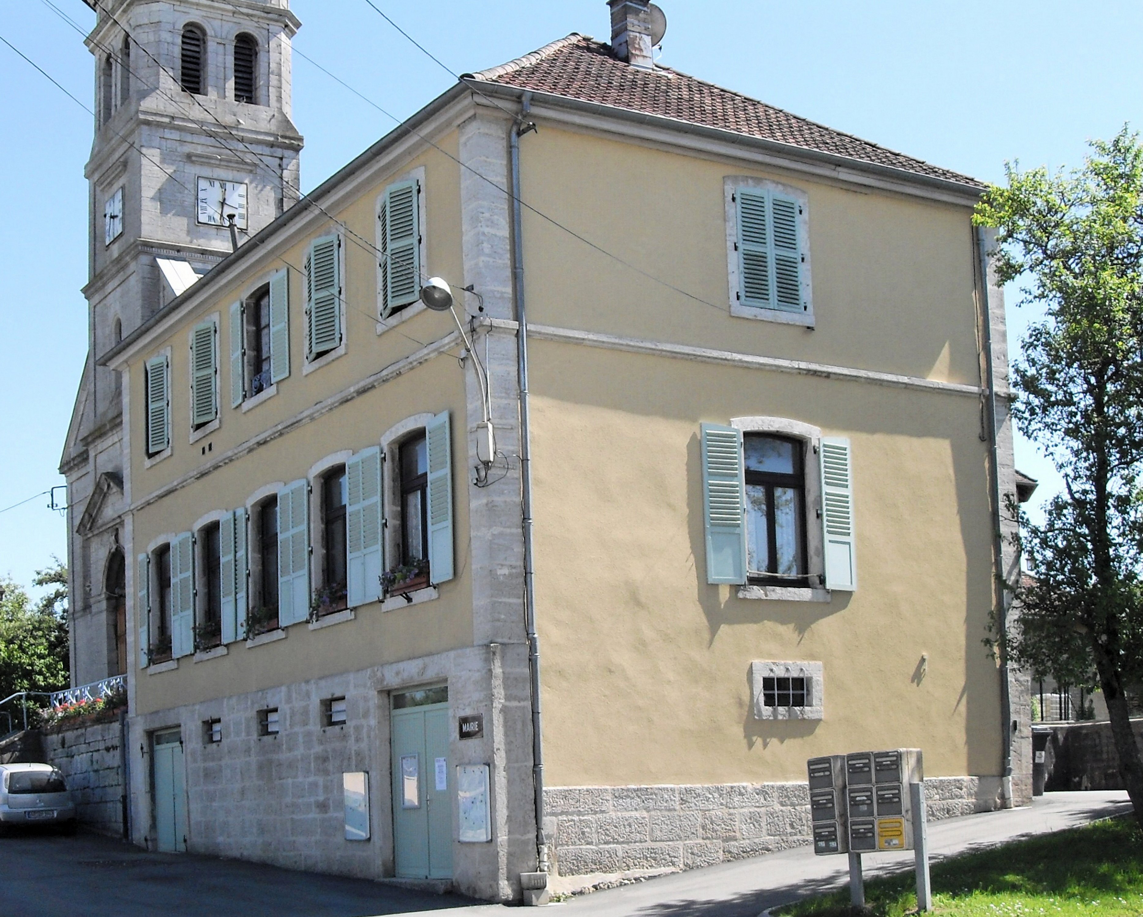 La mairie de Boron